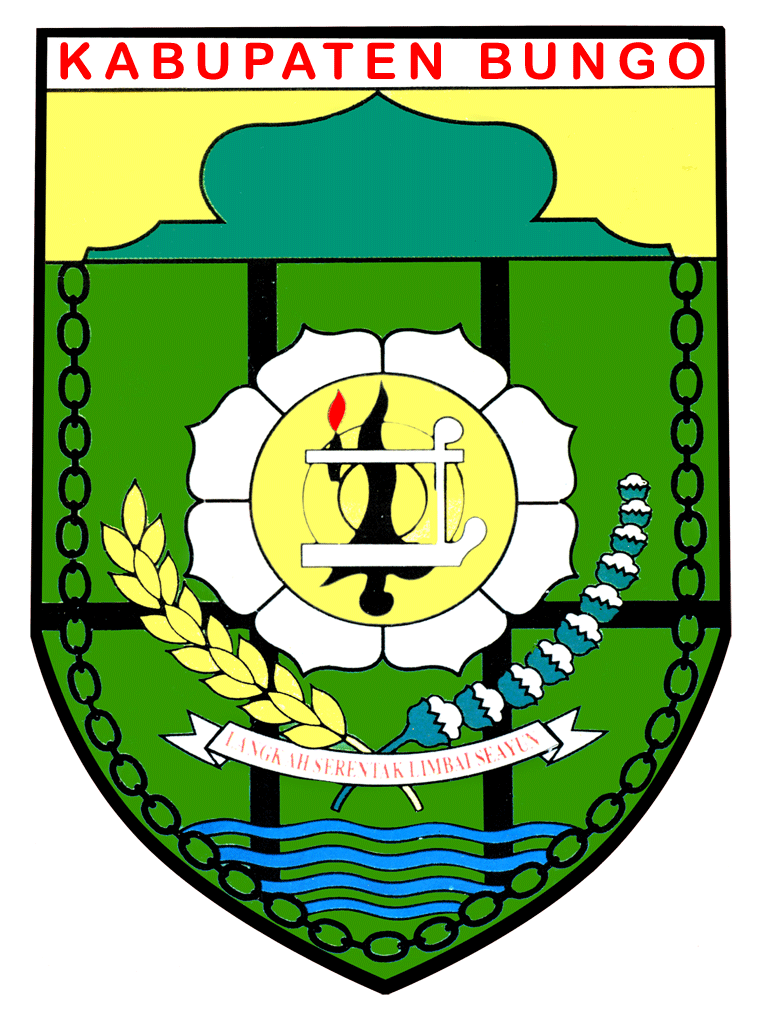 Bungo